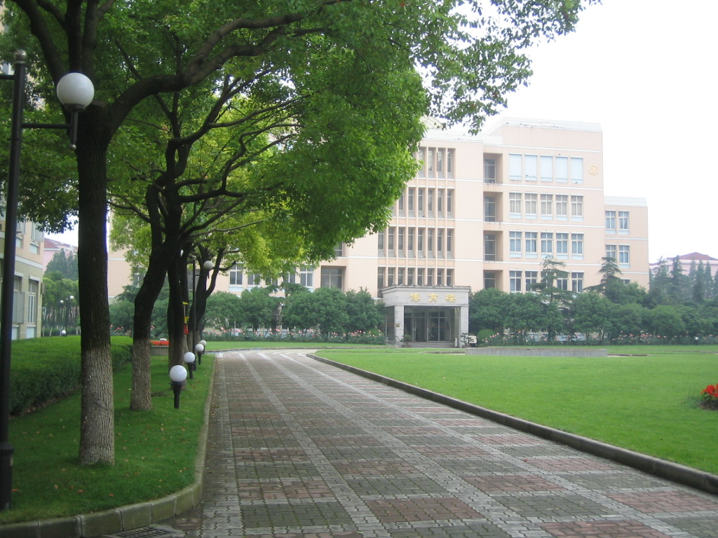 上海市位育中学博育楼